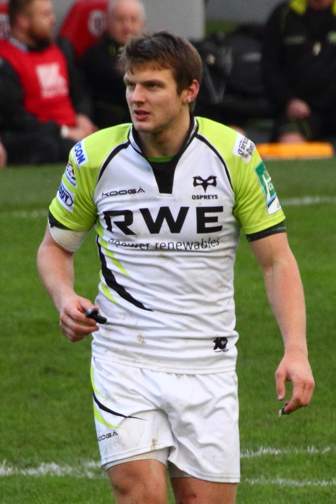 Heineken Cup 2012-2013 — 8 décembre 2012, Stade Ernest Wallon. Match between: Stade toulousain — Ospreys